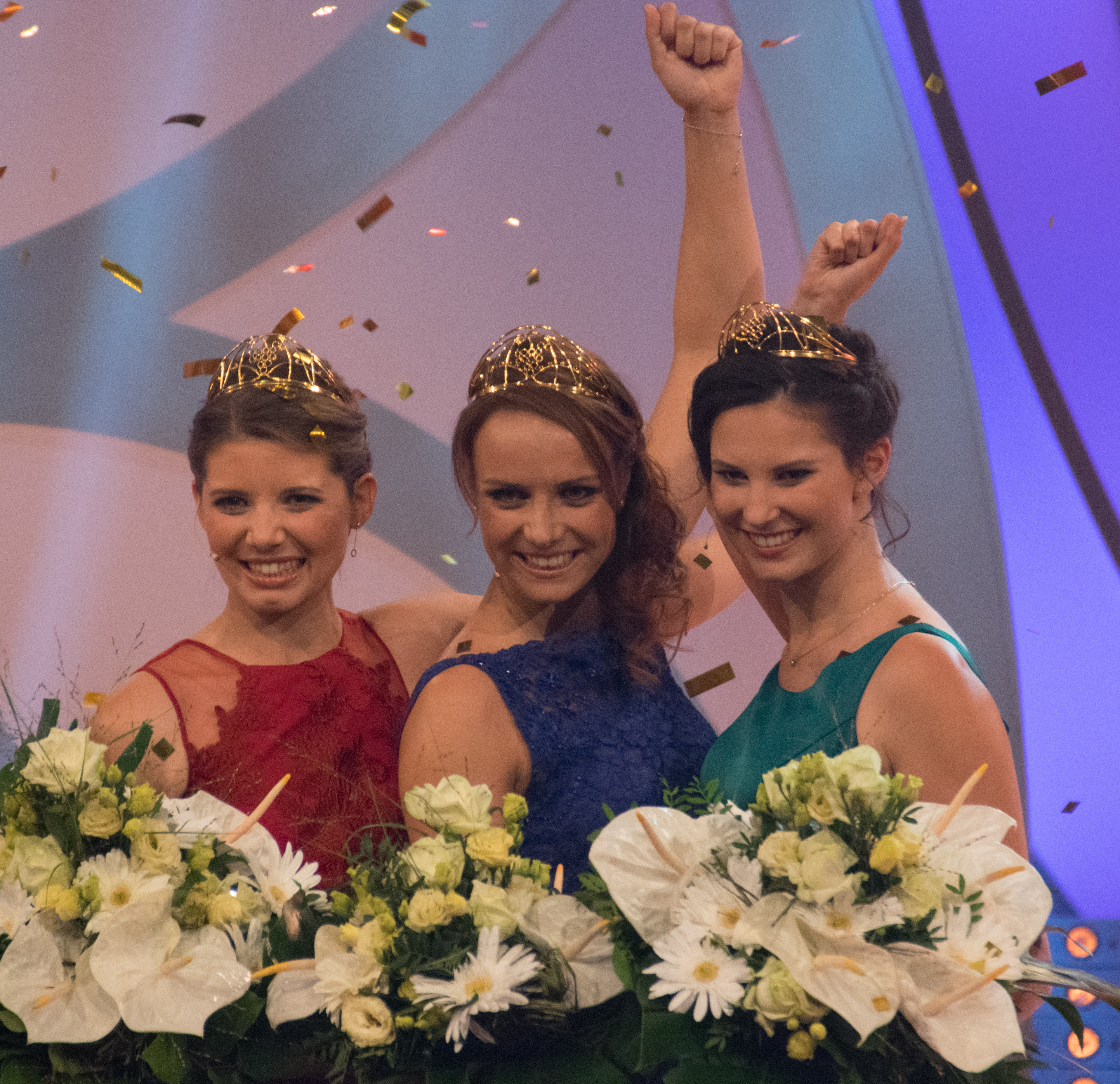 Wahl zur 68. Deutschen Weinkönigin am 30. September 2016 in Mainz, Rheingoldhalle